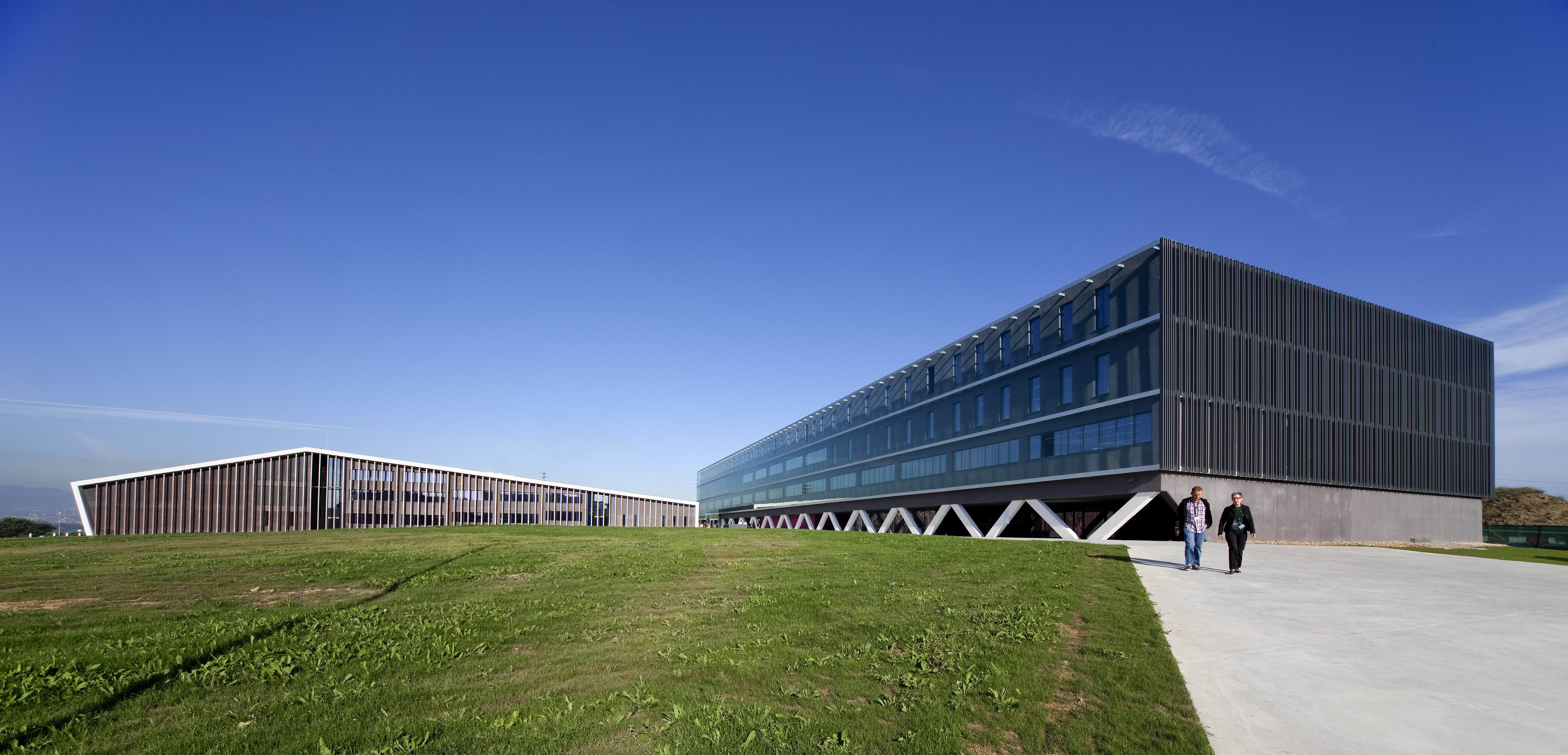 UPV/EHUko Bilboko Hezkuntza Fakultatearen ikuspegi orokorra